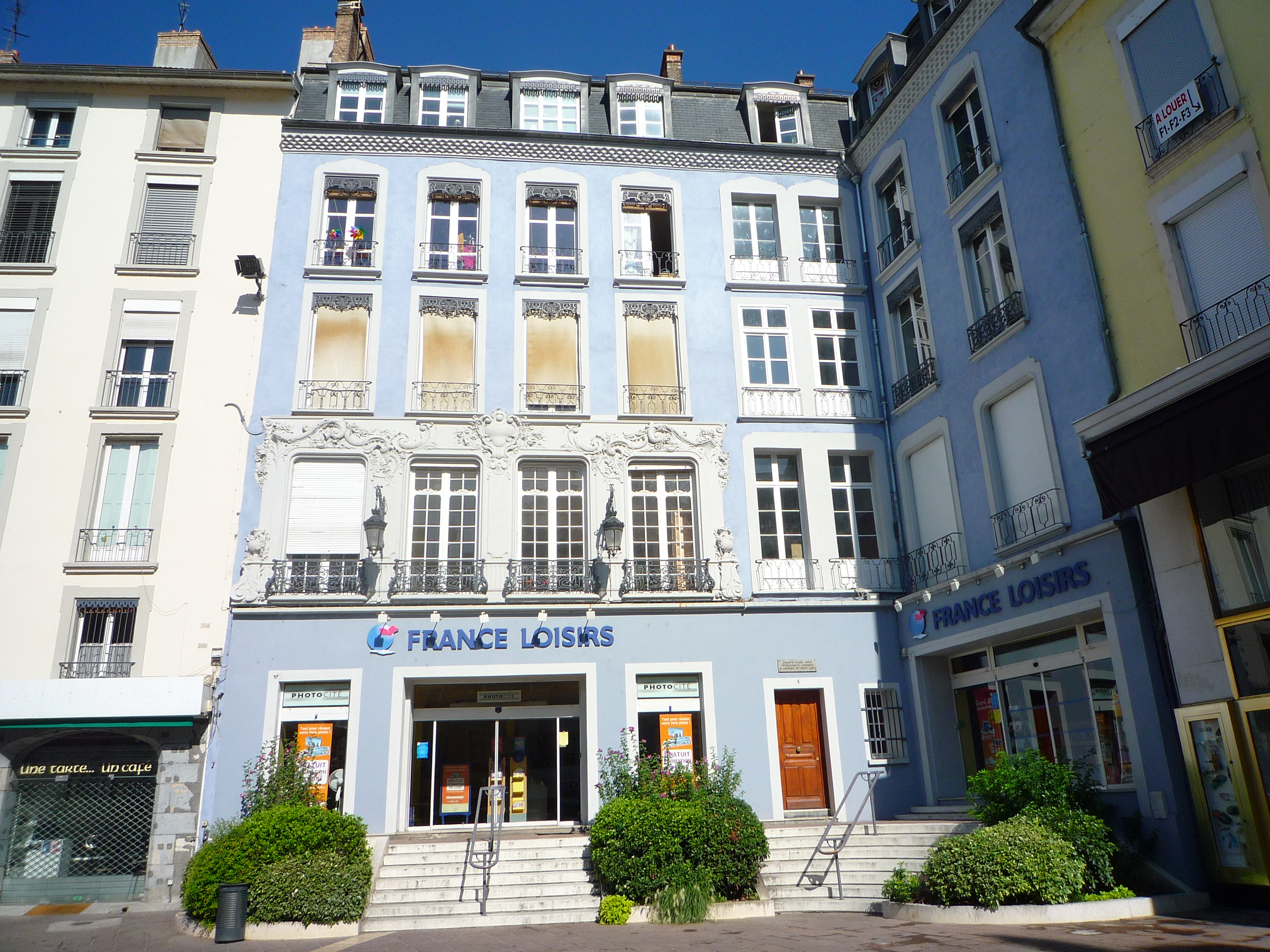 Ancienne mairie de Grenoble de 1683 à 1719, 4 place Grenette